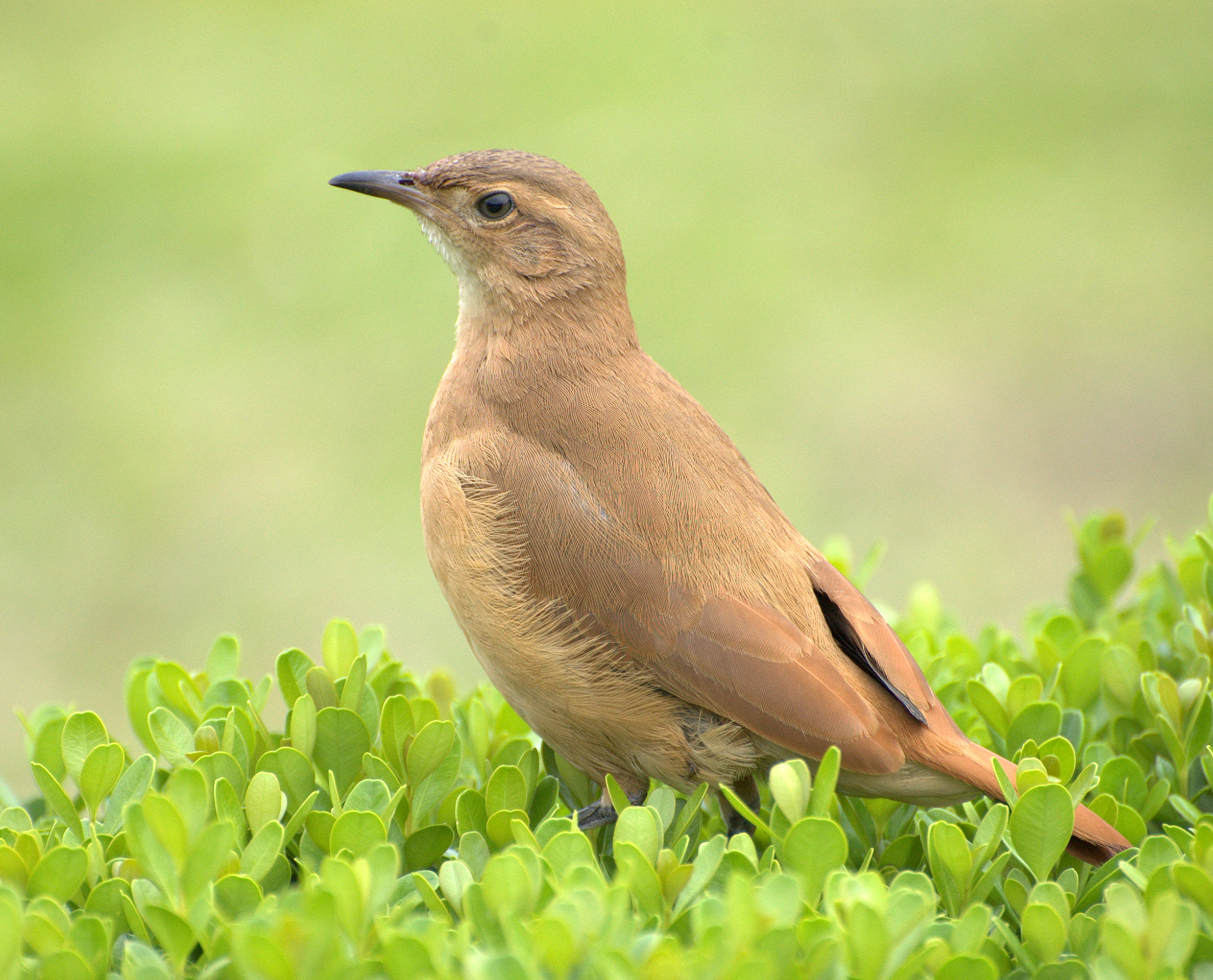 (Furnarius rufus) Parque da Independência, Museu do Ipiranga, São Paulo